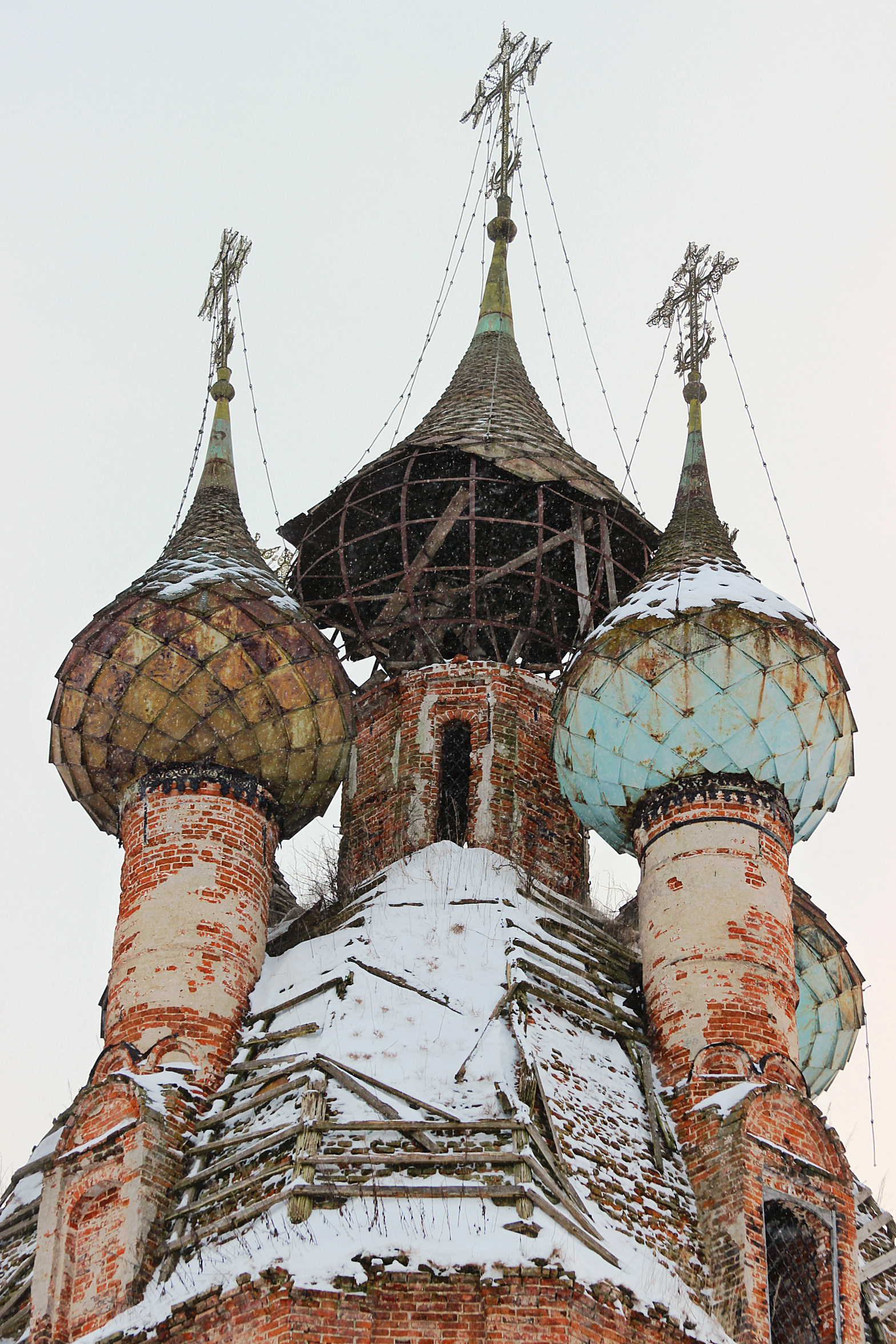 Казанская церковь: Курба, Ярославский район, Ярославская область